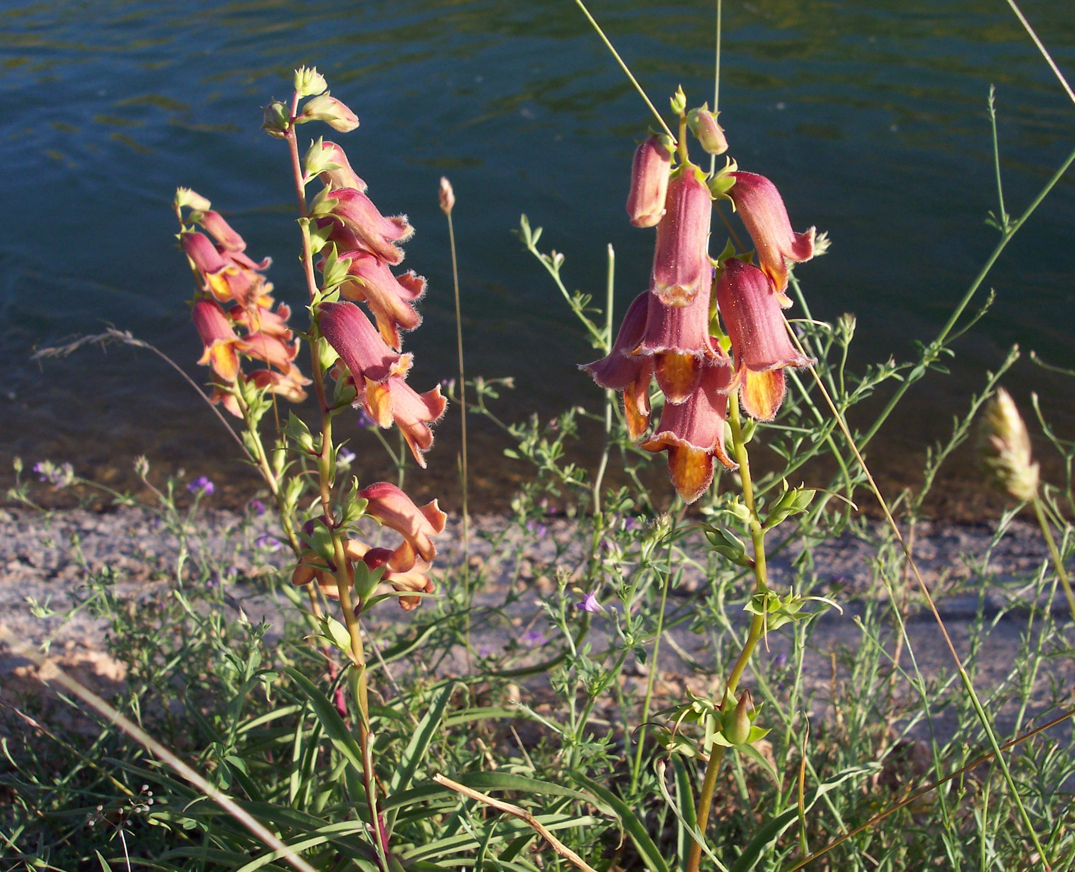 Digitalis obscura. Olivares de Júcar, Cuenca, España.